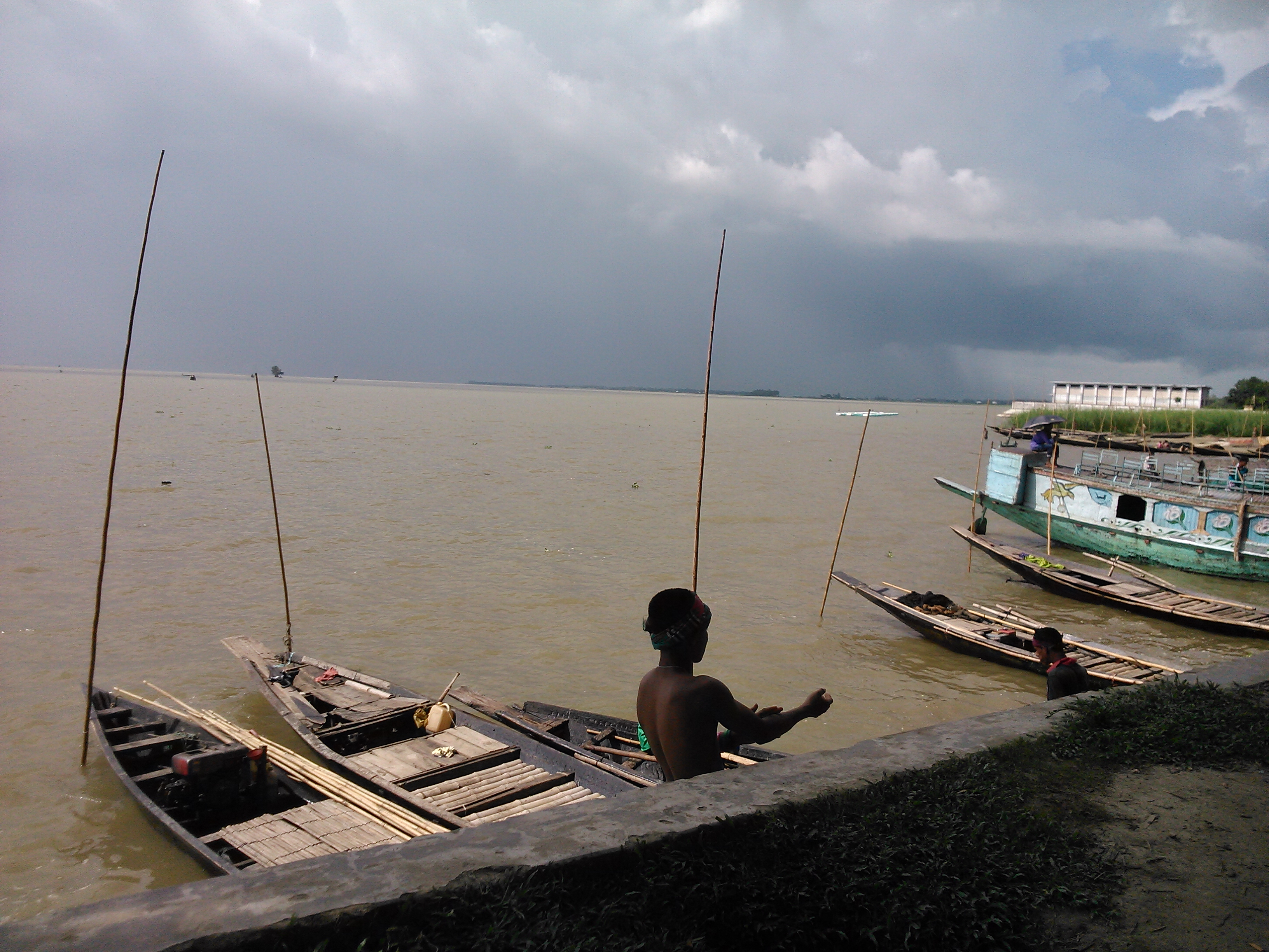 নাসিরনগর নদী ঘাট